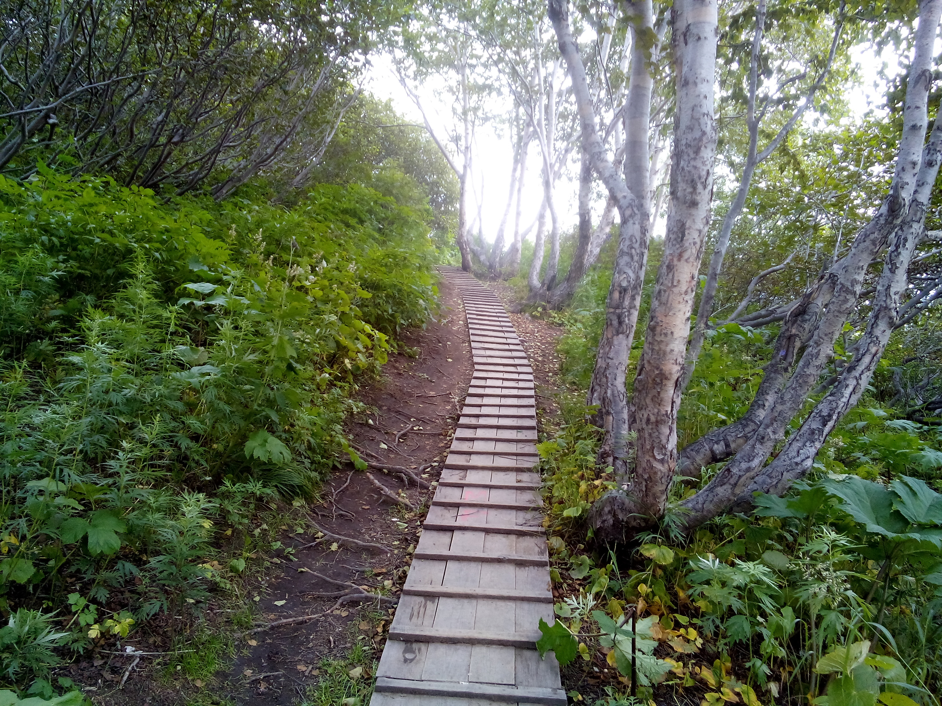 Мишенная сопка, Петропавловск-Камчатский